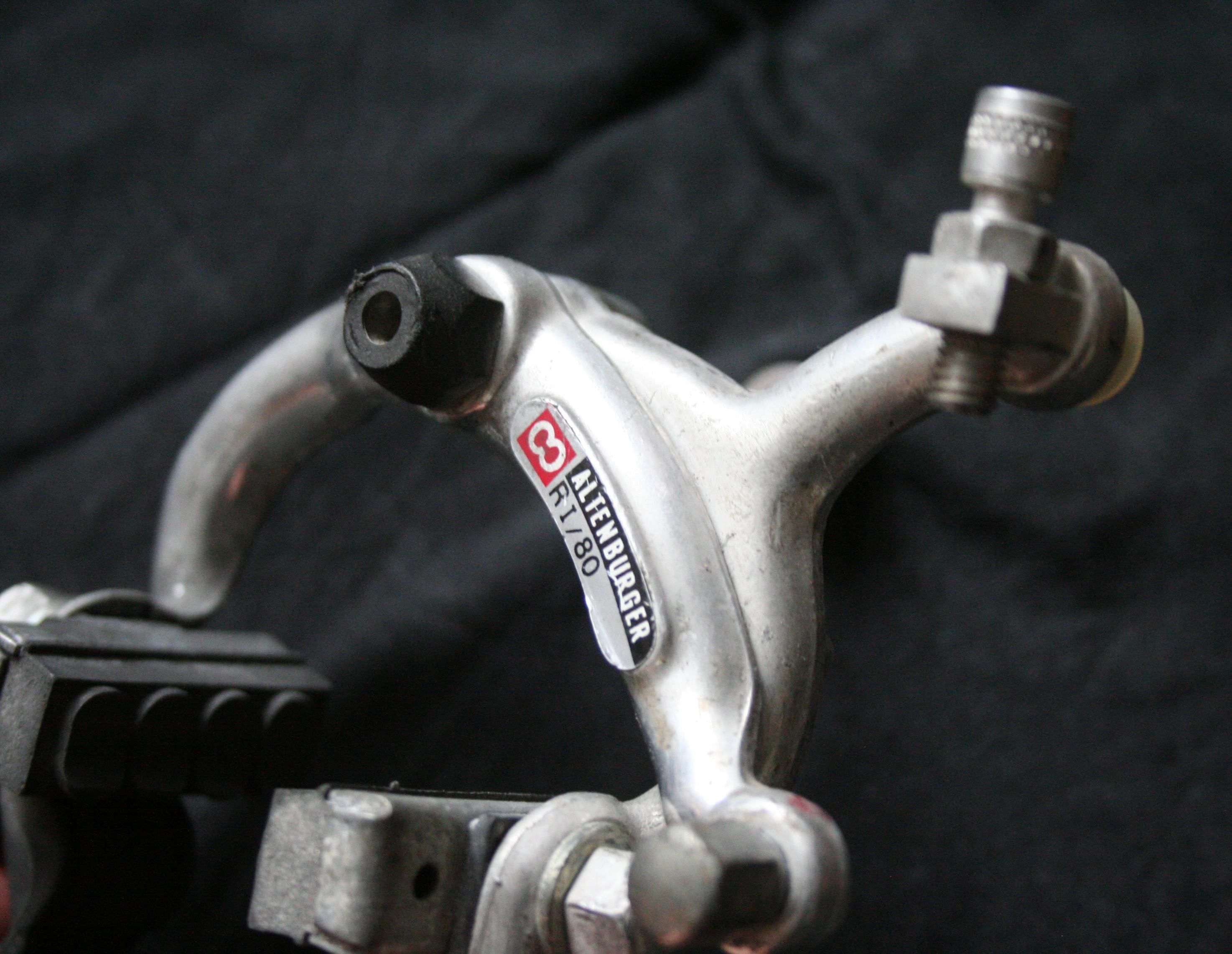 Altenburger brakes